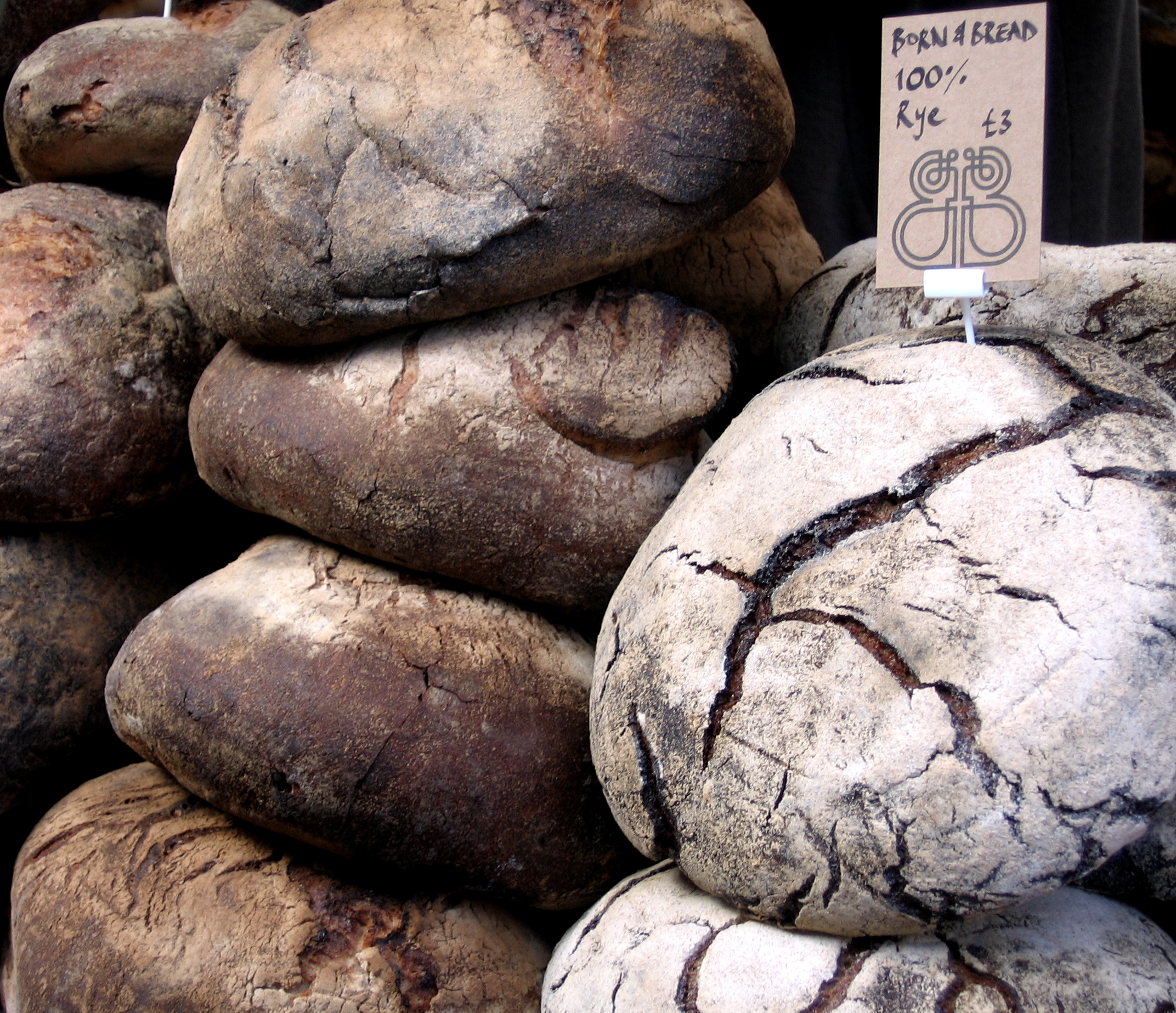 Covent Garden, bread